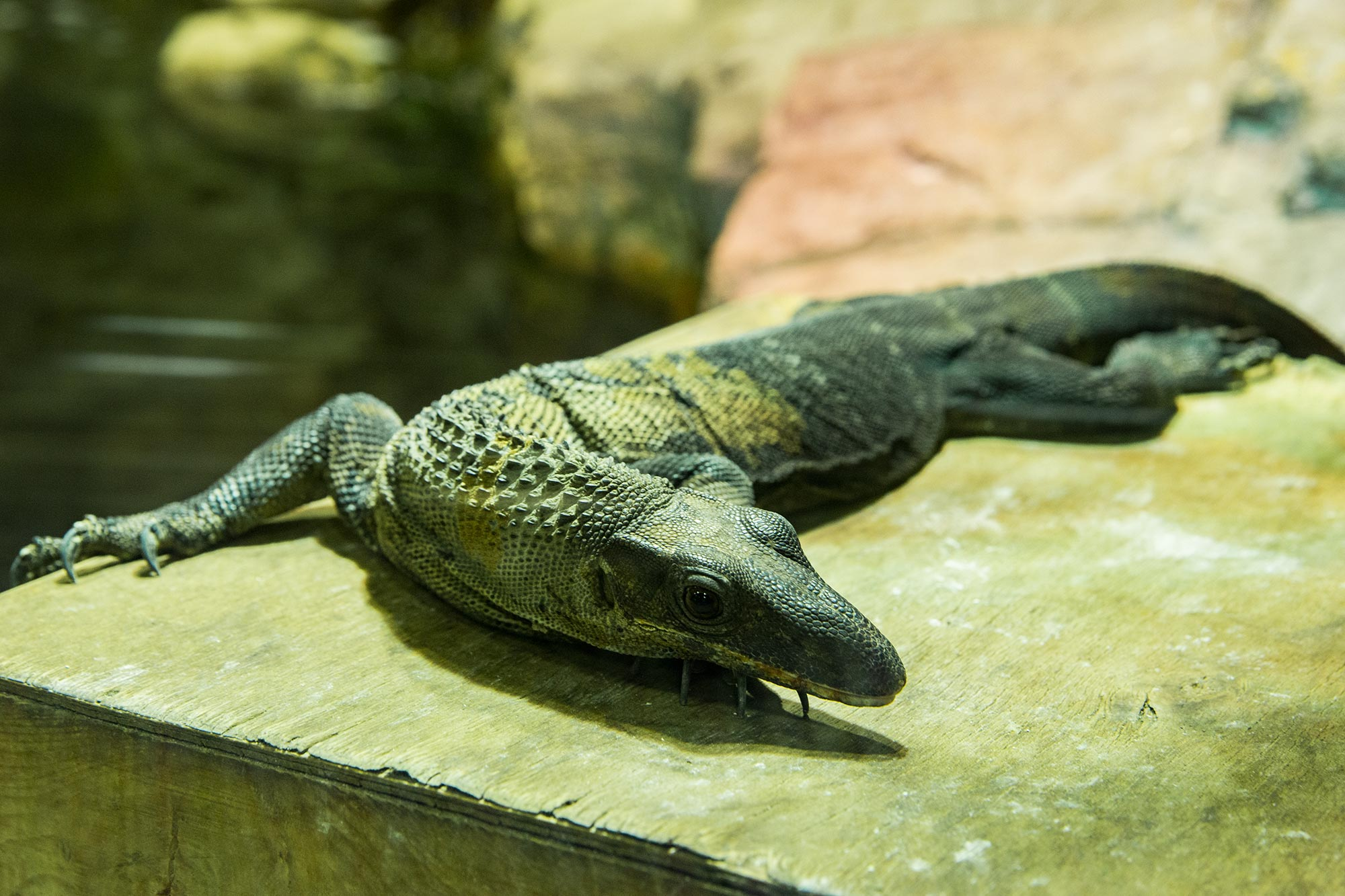 Южноазиатский варан в Московском зоопарке